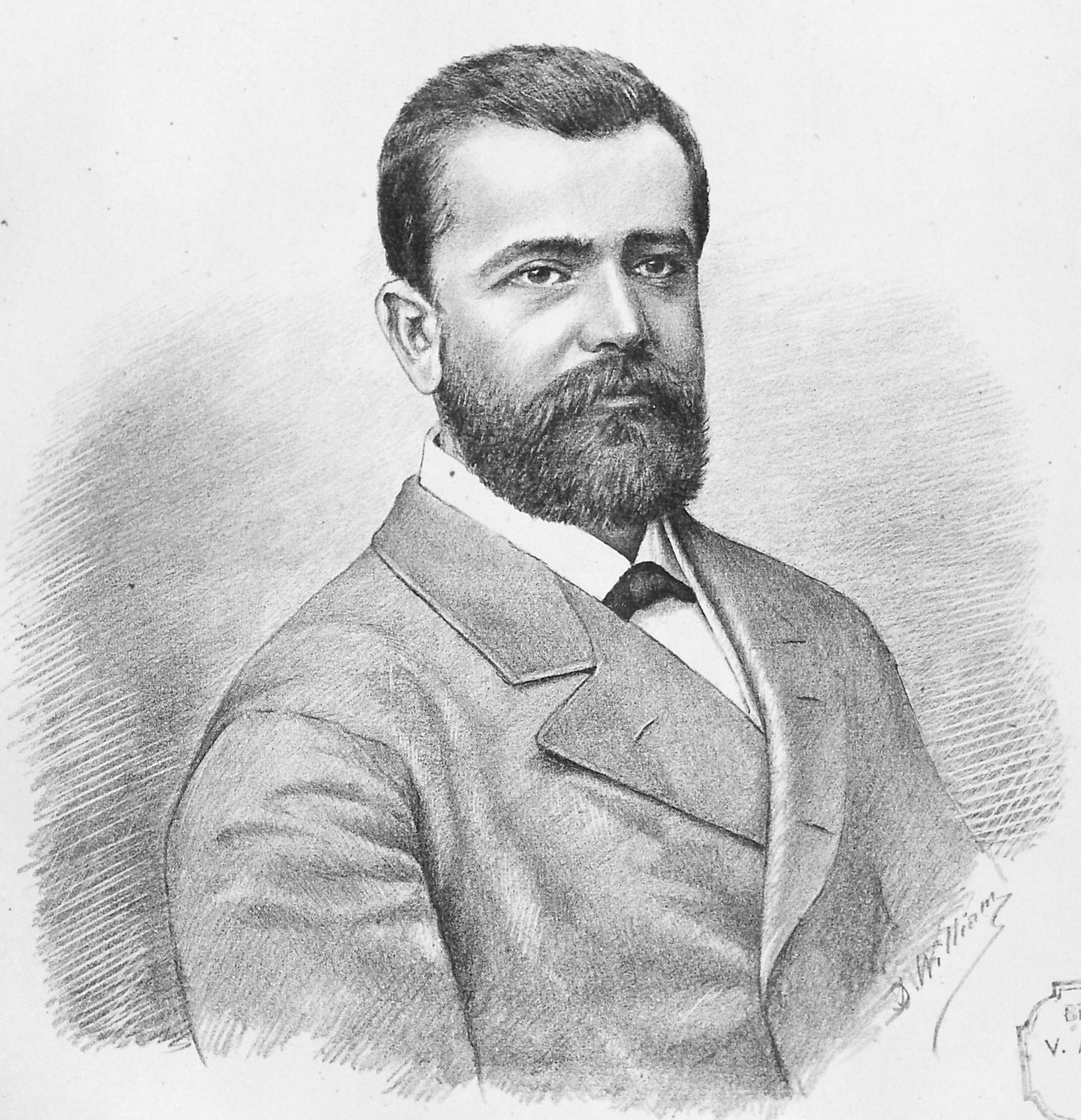 Portraits contemporains avec autographes : Politique, armée, clergé, letters, théatres & arts dessines & lithographies par D. William Bukarest, 1881 N. Fléva - Vice-président de la chambre